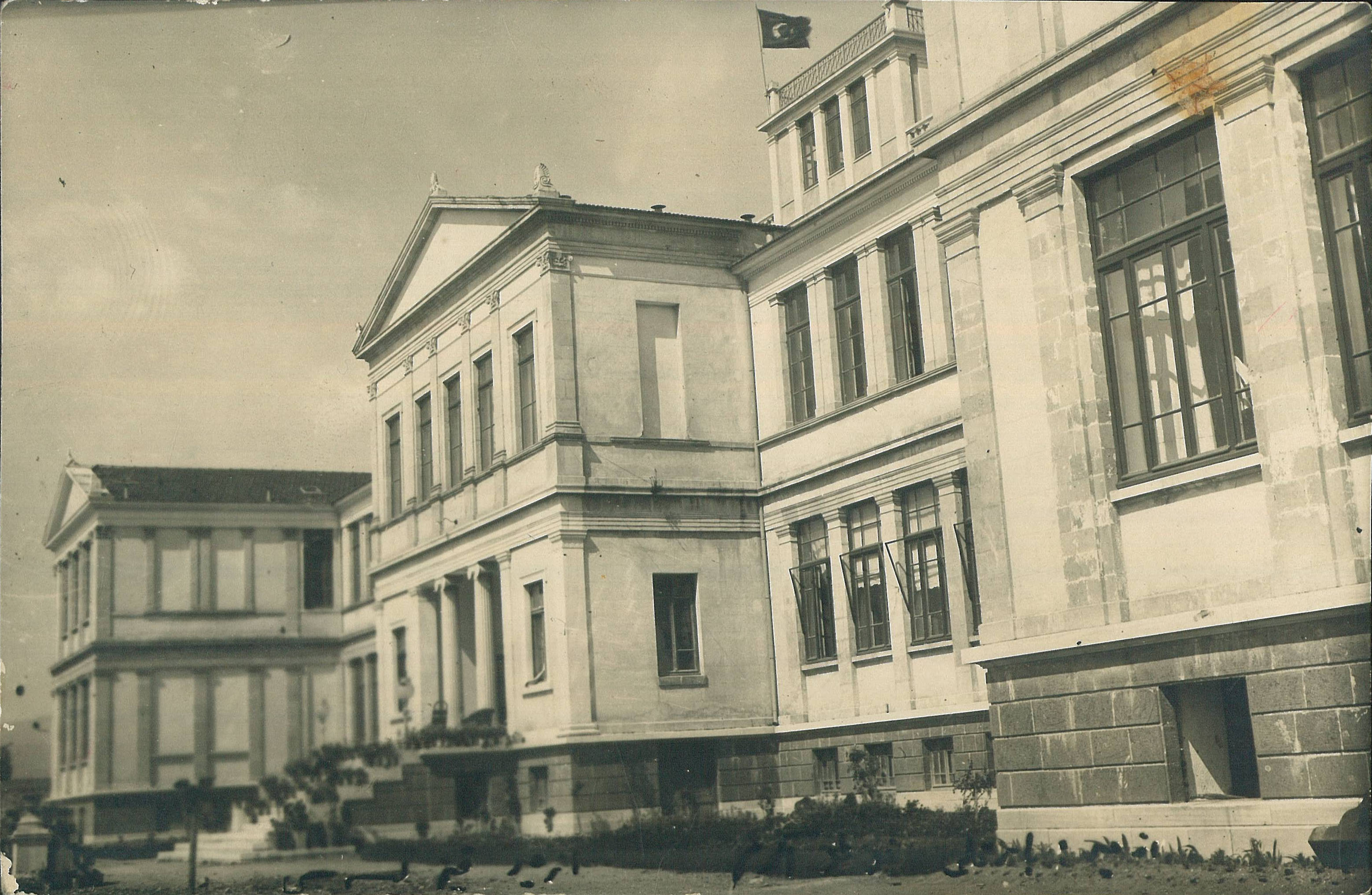 Namık Kemal Lisesinin Geçmişten Bir Görünümü